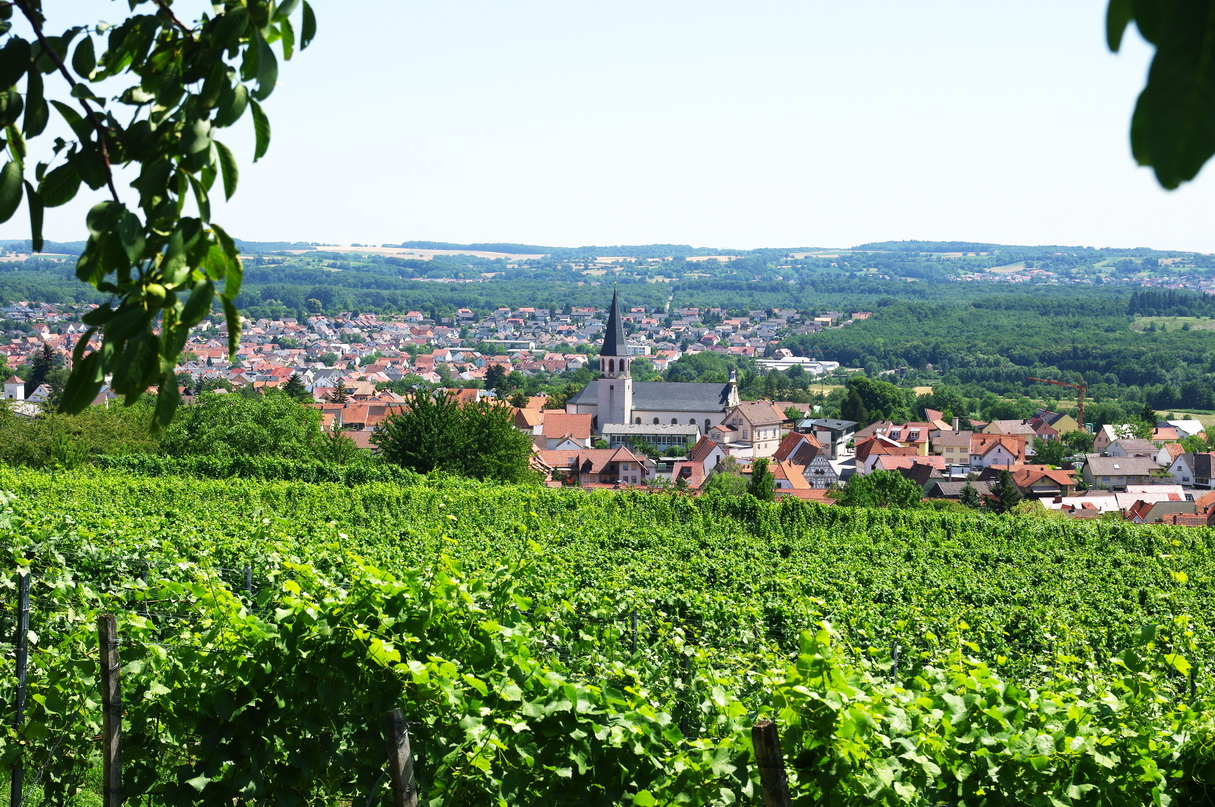 Blick vom Letzenberg auf Malsch